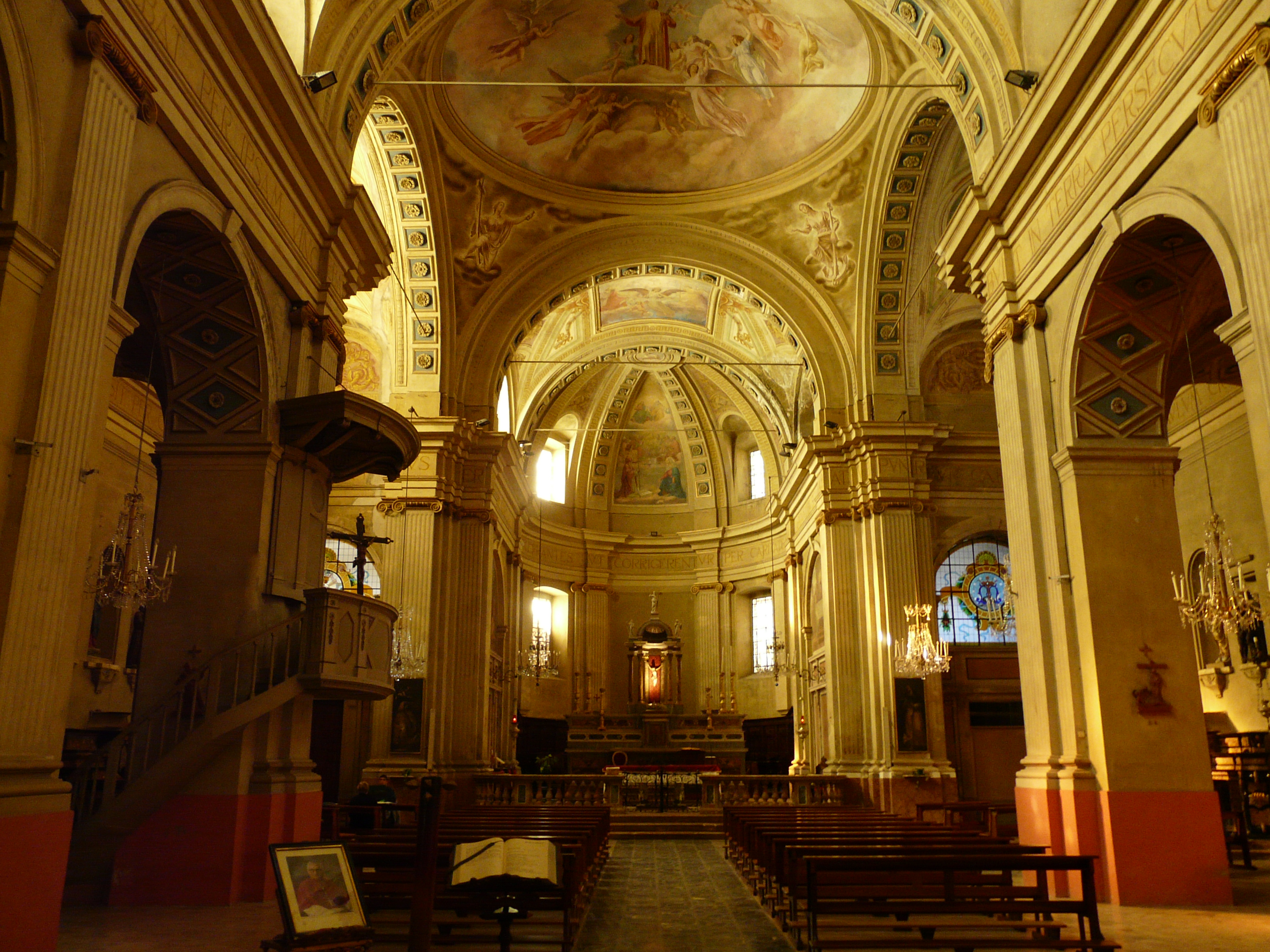 Interno della chiesa di Santo Stefano, Bassignana, Piemonte, Italy